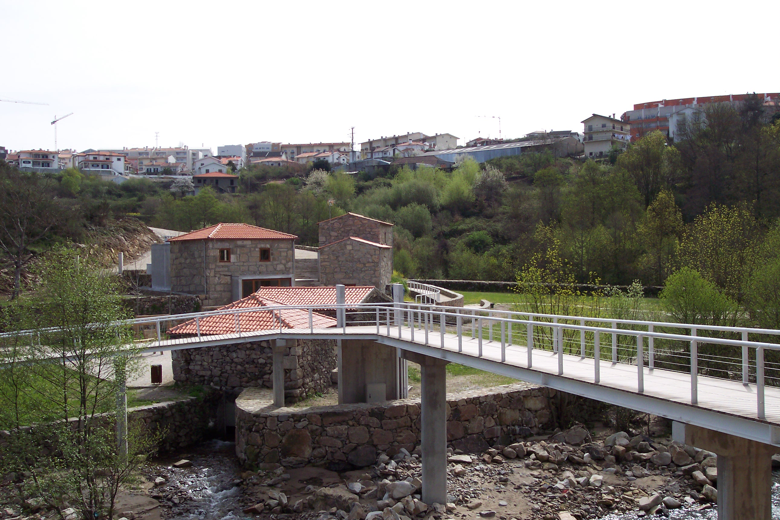 Vila Real, Parque do Corgo, Jan.2003